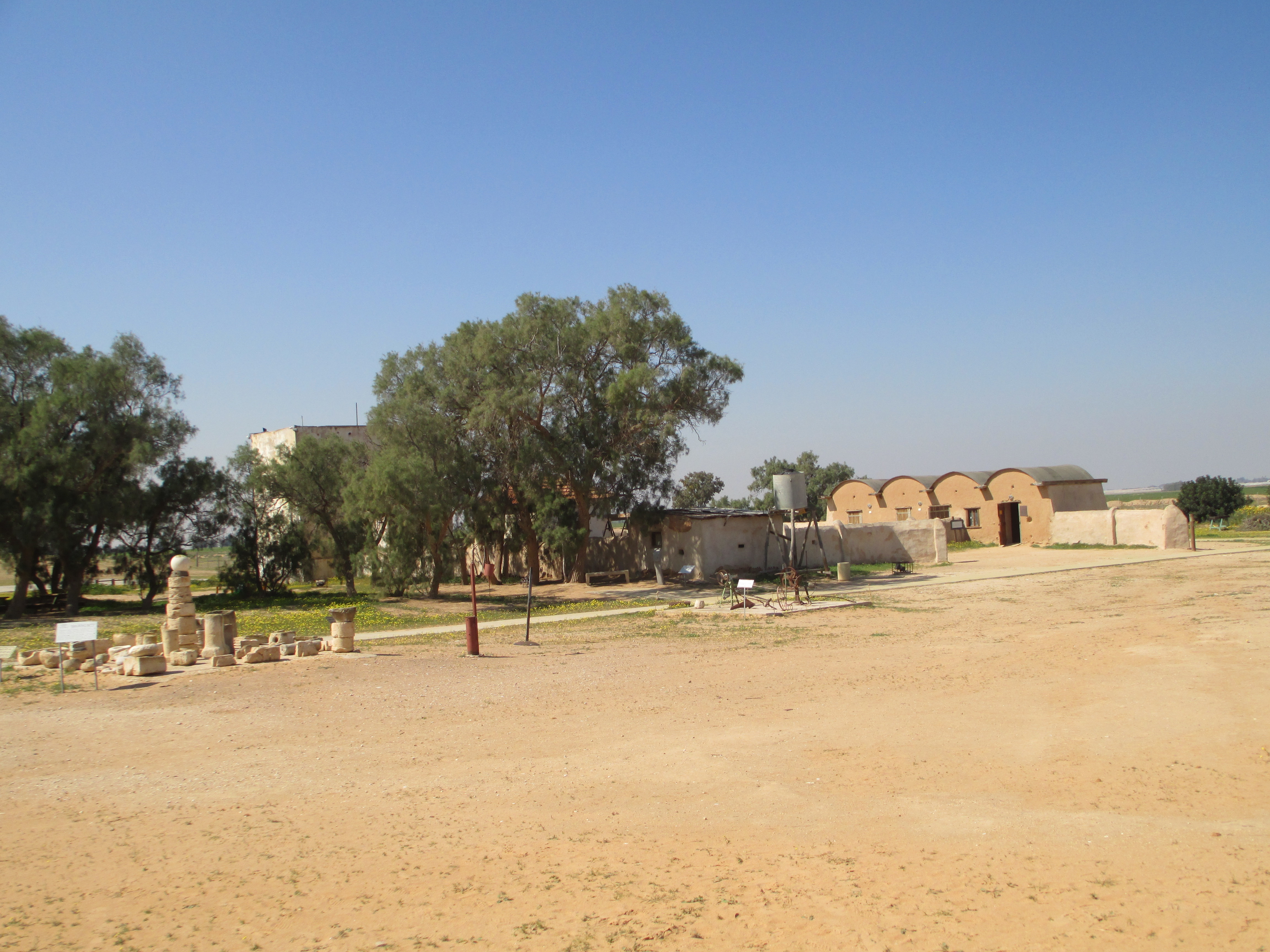 מצפה גבולות